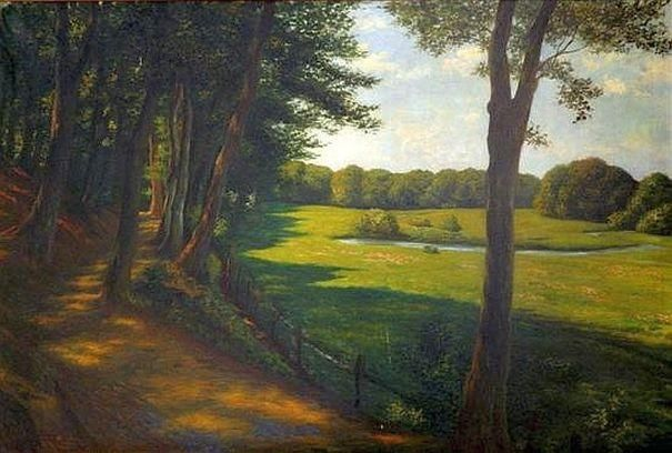 Alstertal bei Wellingsbüttel, Öl auf Leinwand, 100 x 148 cm